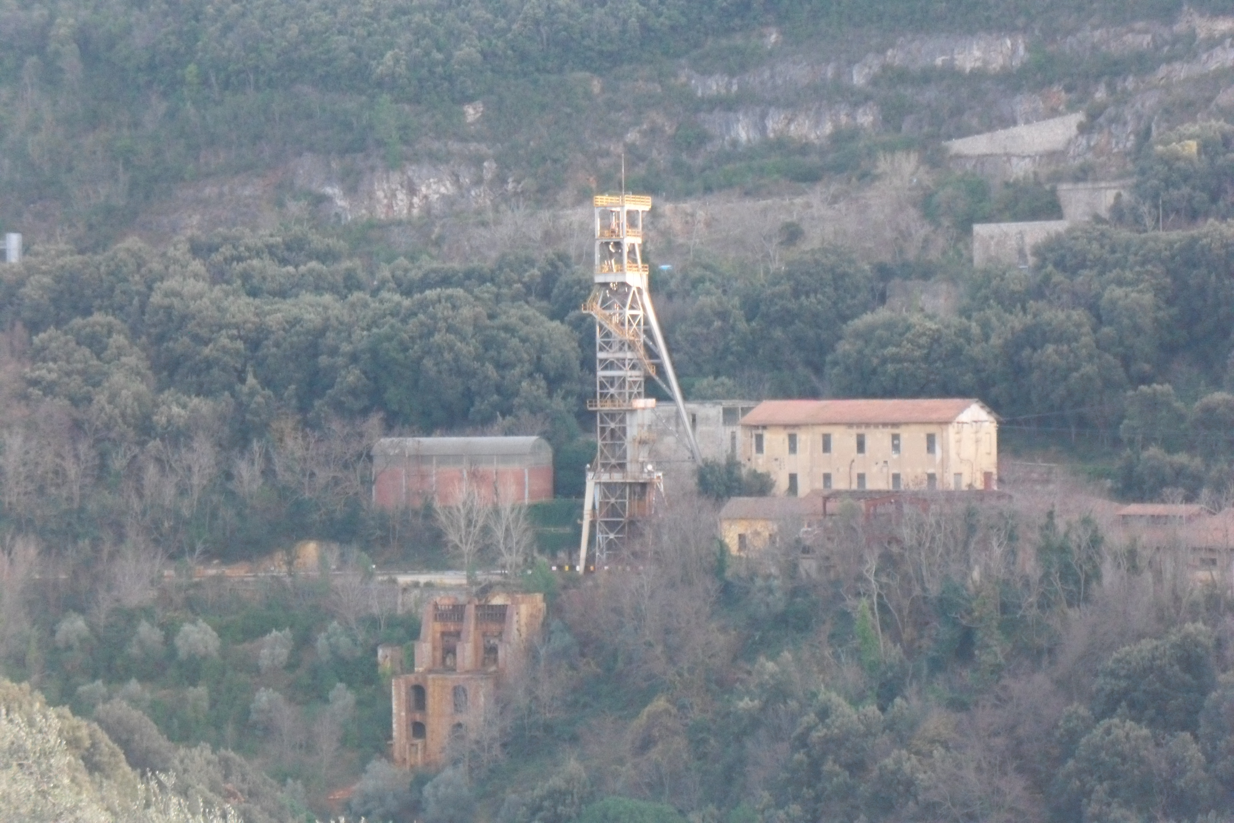 Veduta Pozzo Roma